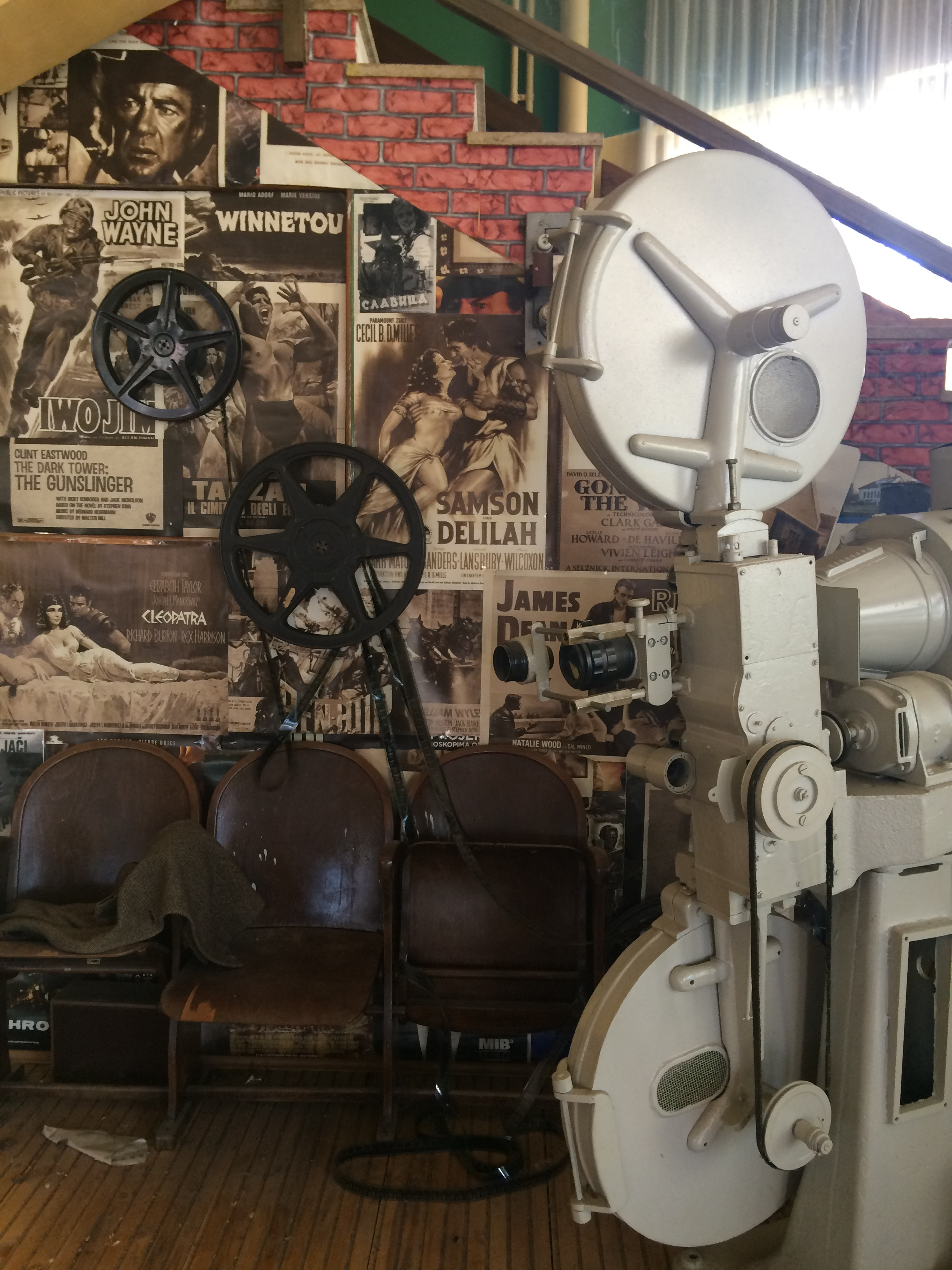 Sala u Domu kulture u Trsteniku